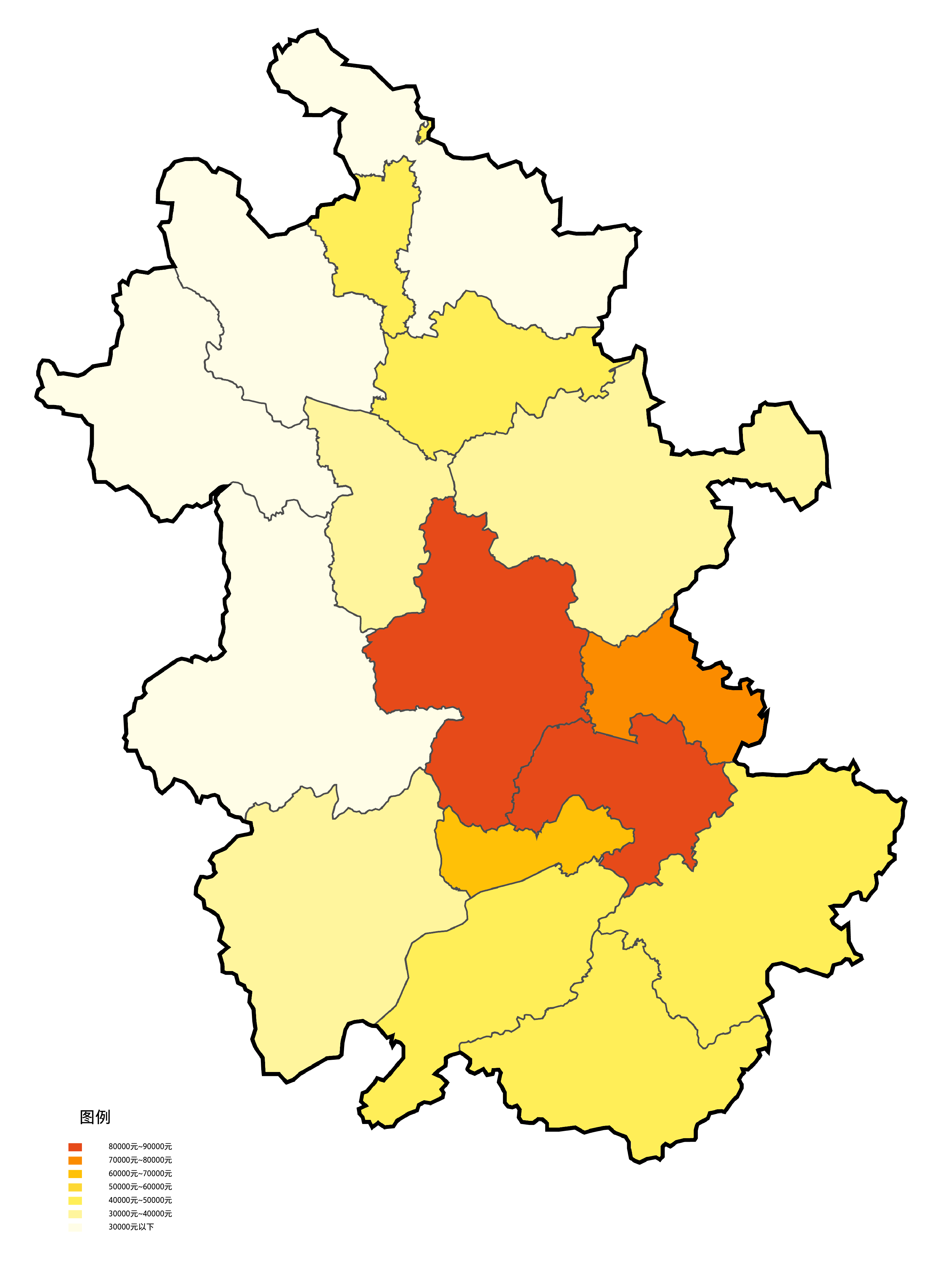 中文（中国大陆）: 安徽神各地级市根据2017年人均地区生产总值填色地图